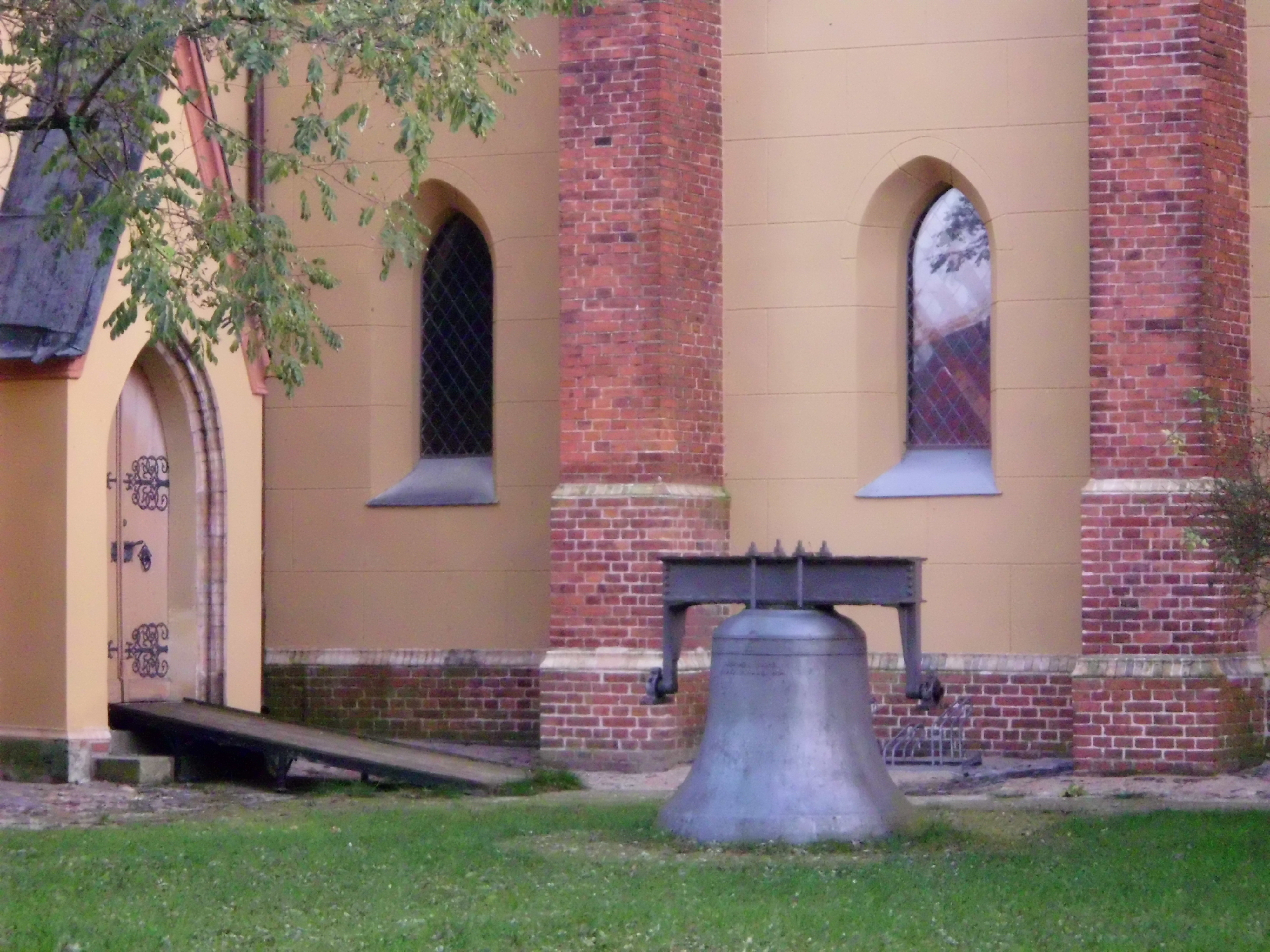 Heilig-Geist-Kirche in Werder (Havel)